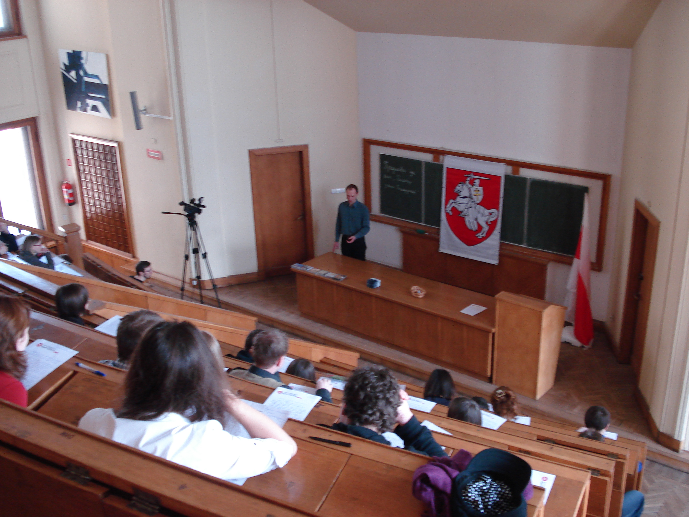 Dyktando z języka białoruskiego w Warszawie zorganizowane przez Białoruską Pamięć Narodową.